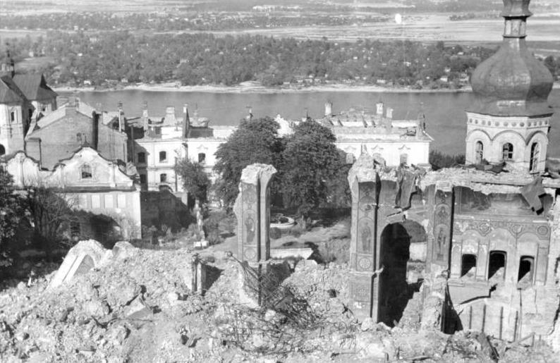 Kiew, Juli 1943 Ansicht vom Glockenturm auf die zerstörte Lawra. F.R.29/11